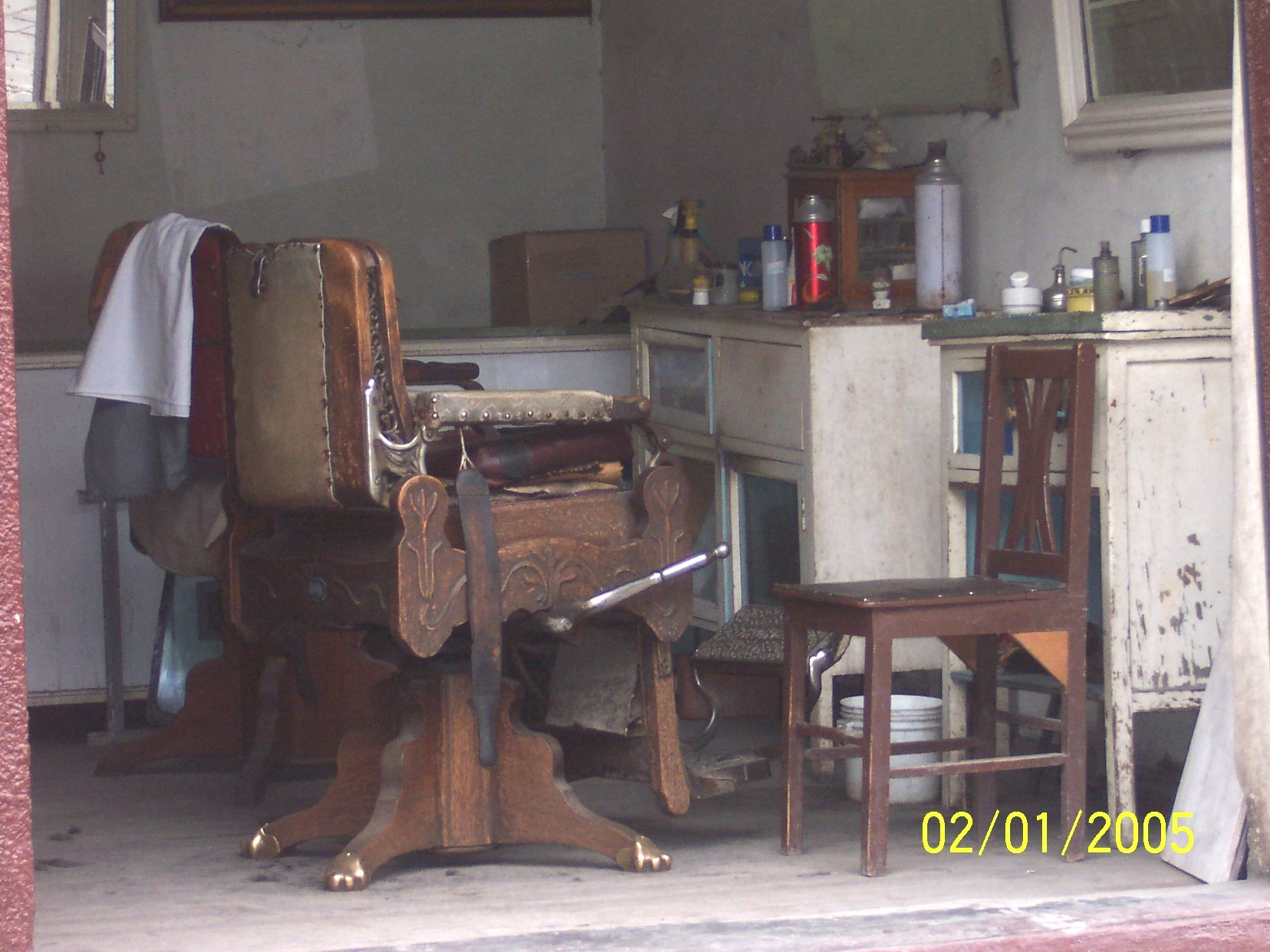 Peluquería tradicional, aun en operación, en la ciudad de Cuenca, Ecuador Autor: Alfredobi Fecha: 2005